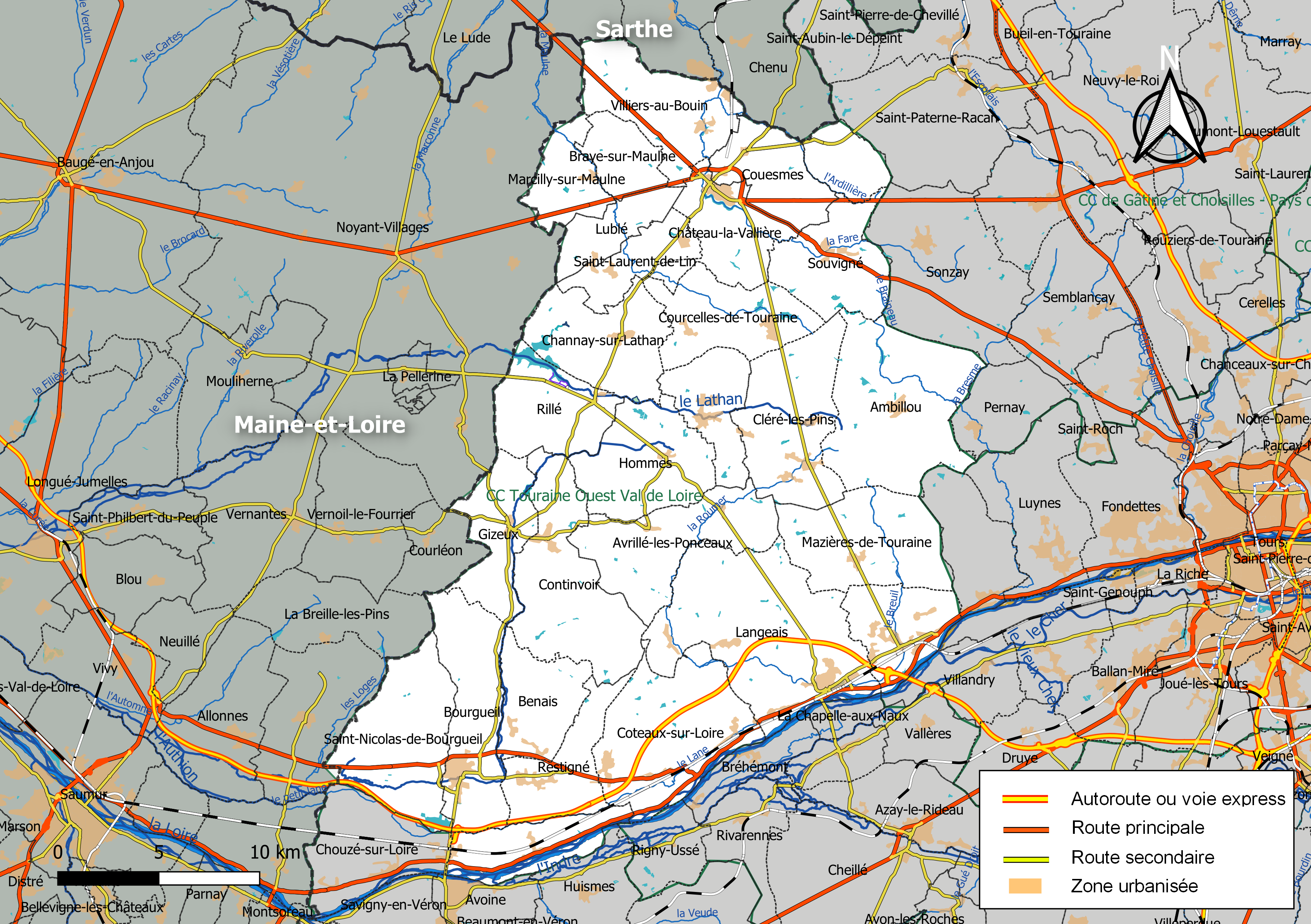 Carte de la communauté de communes Touraine Ouest Val de Loire, département d'Indre-et-Loire, France. Composition au 1er janvier 2019.